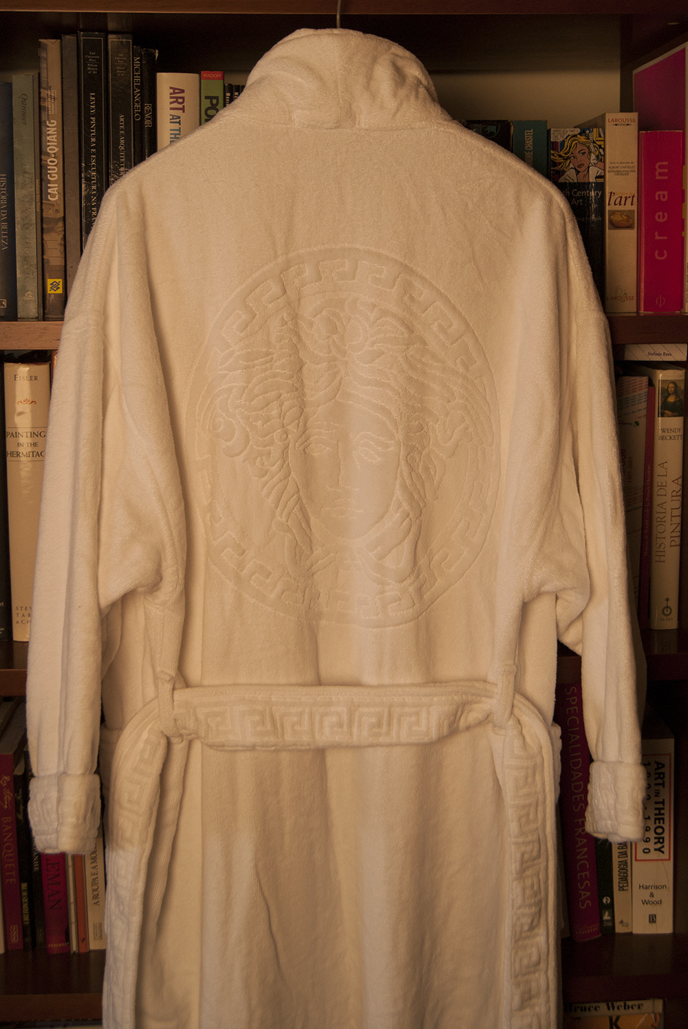 Roupão de toalha mega felpuda 100% algodão Gianni Versace, com dois bolsos grandes na frente, a Medusa Greca nas costas e um cinto separado também de toalha com a greca. Para usar na piscina ou em casa no inverno ou com ar condicionado ligado porque ela é bem pesada (nem precisa levar toalha para a piscina, só o roupão já basta). R$ 500